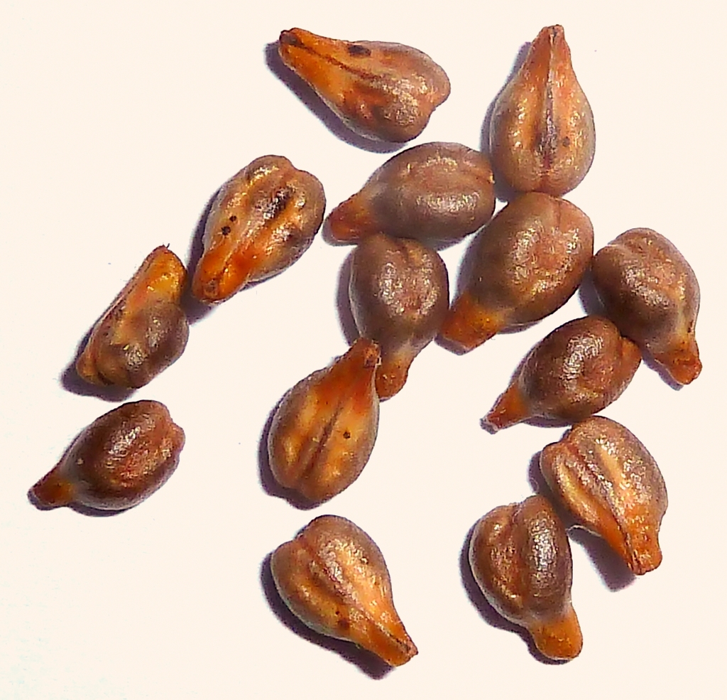 Vitis vinifera cv."Red Globe" , Comercio, Madrid (España).